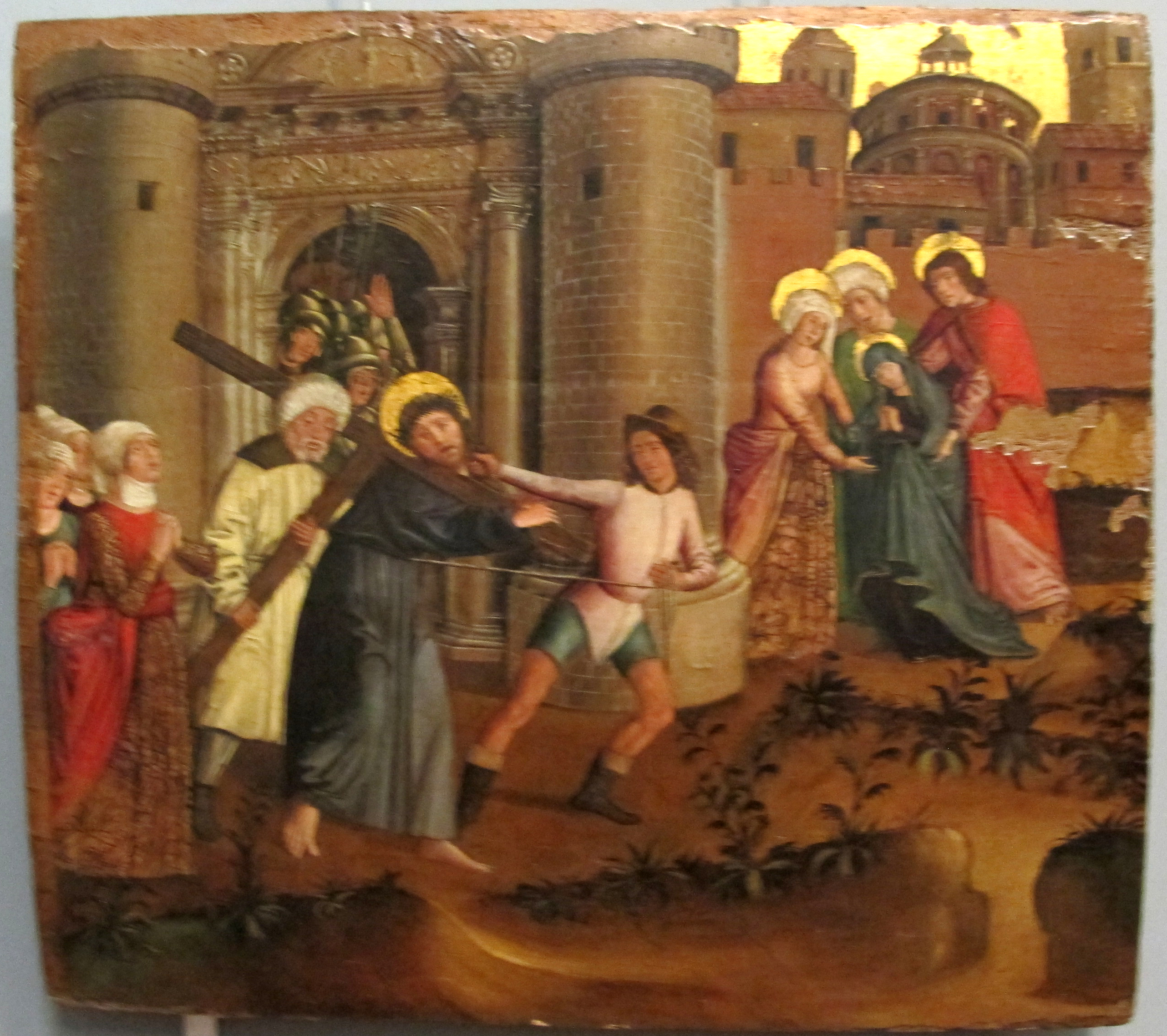 Galleria Napoletana (Museo di Capodimonte)